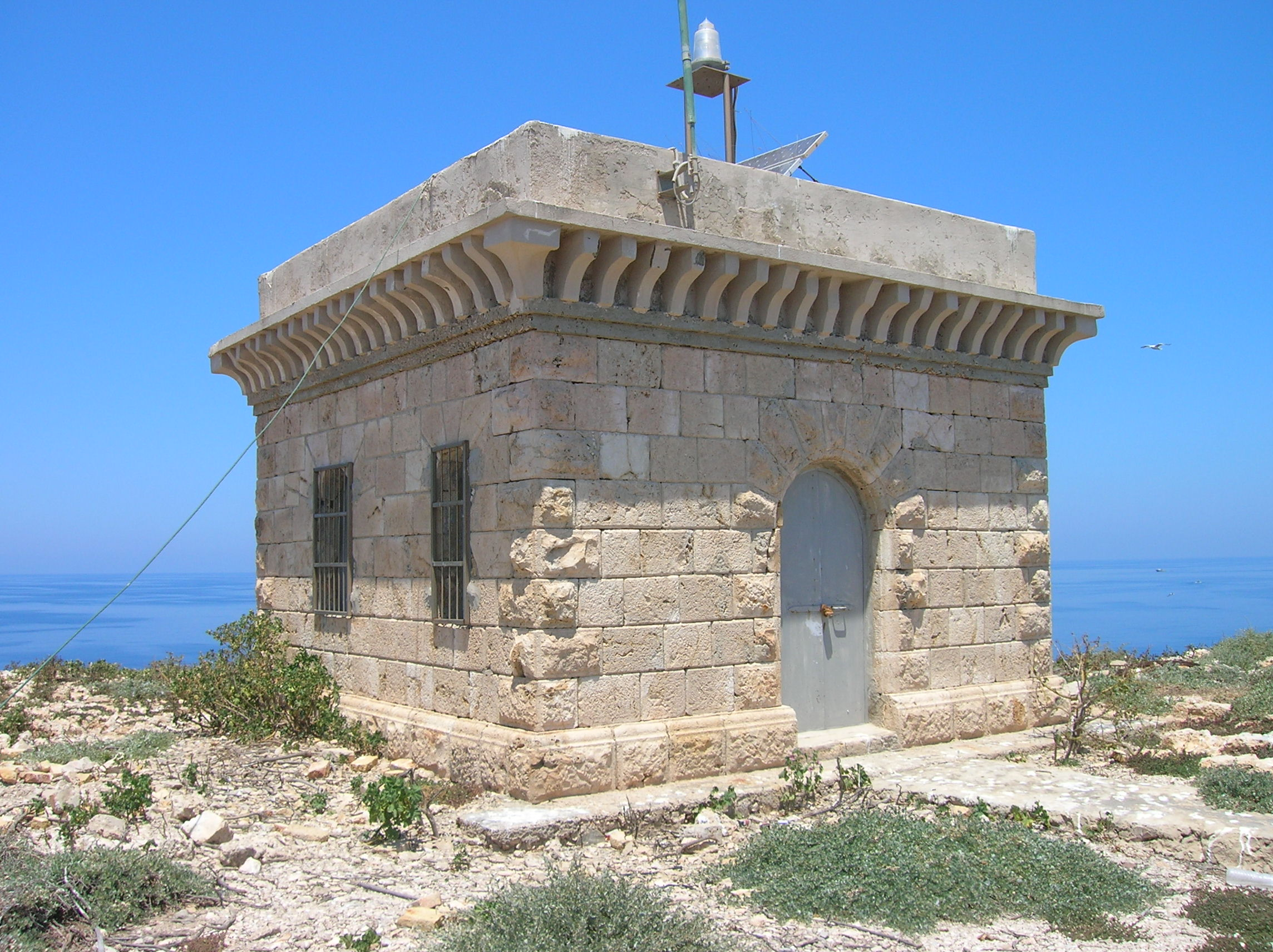 Isola di Lampione Faro